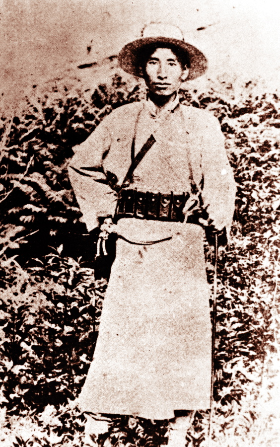 독립운동가 신팔균